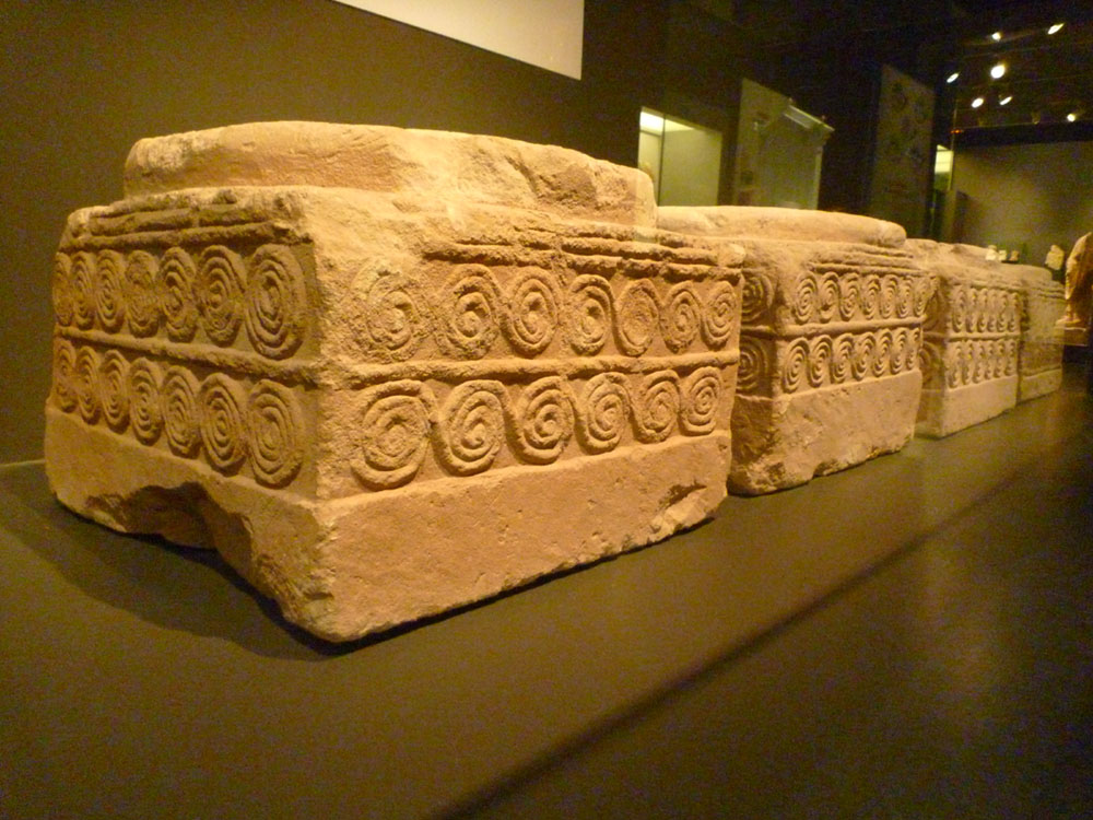 Basas de la basílica paleocristiana de Algezares en Murcia (España).